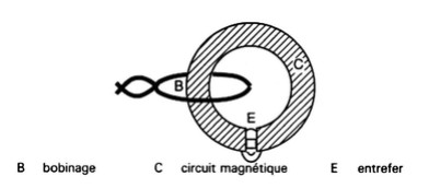 Bobinage, circuit magnétique, entrefer